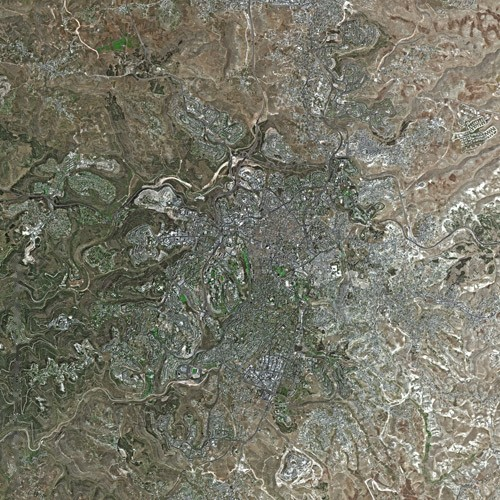 Jerusalem by SPOT Satellite